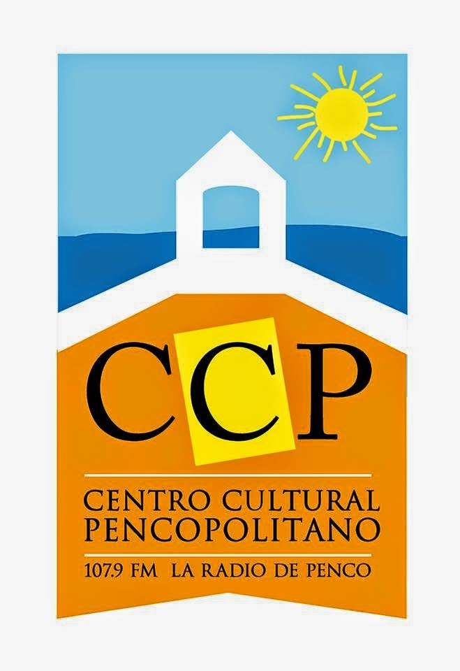 Es el logo del CCP